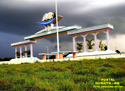 Inaugurado em 15 de maio de 2008, o monumento está localizado na BR 230 (Transamazônica) aproximadamente cinco quilômetros da cidade de Humaitá a “Princesa do Madeira”, é o ponto turístico mais fotografado do Município.